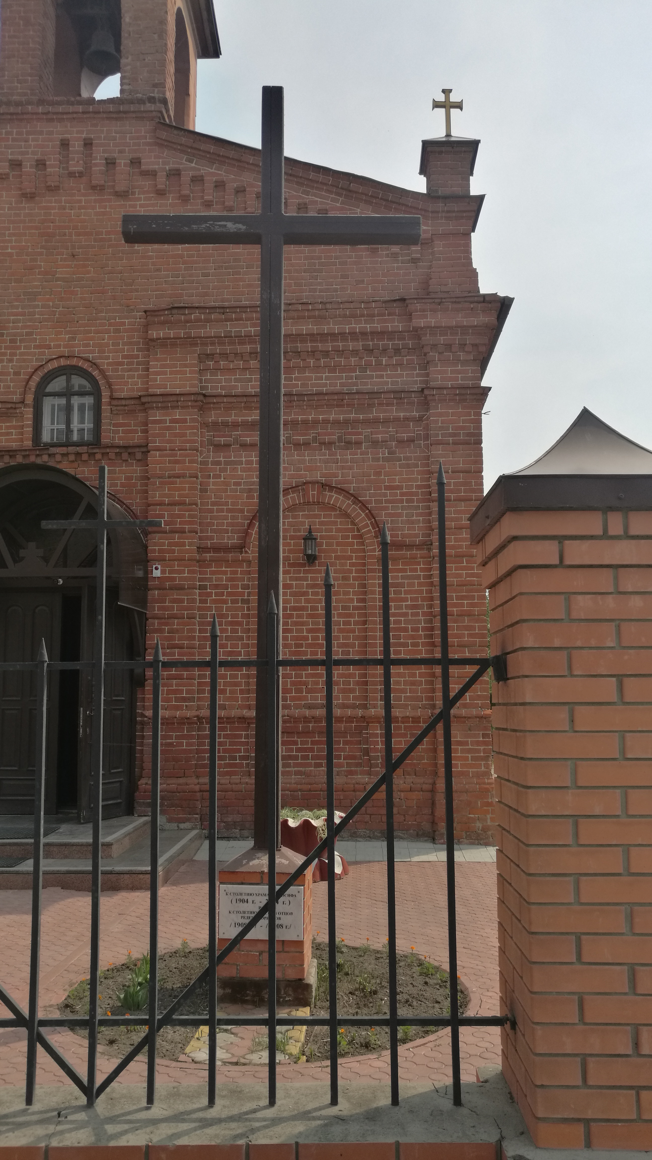 Strato Perekopskaja. Tjumeno, Rusio.